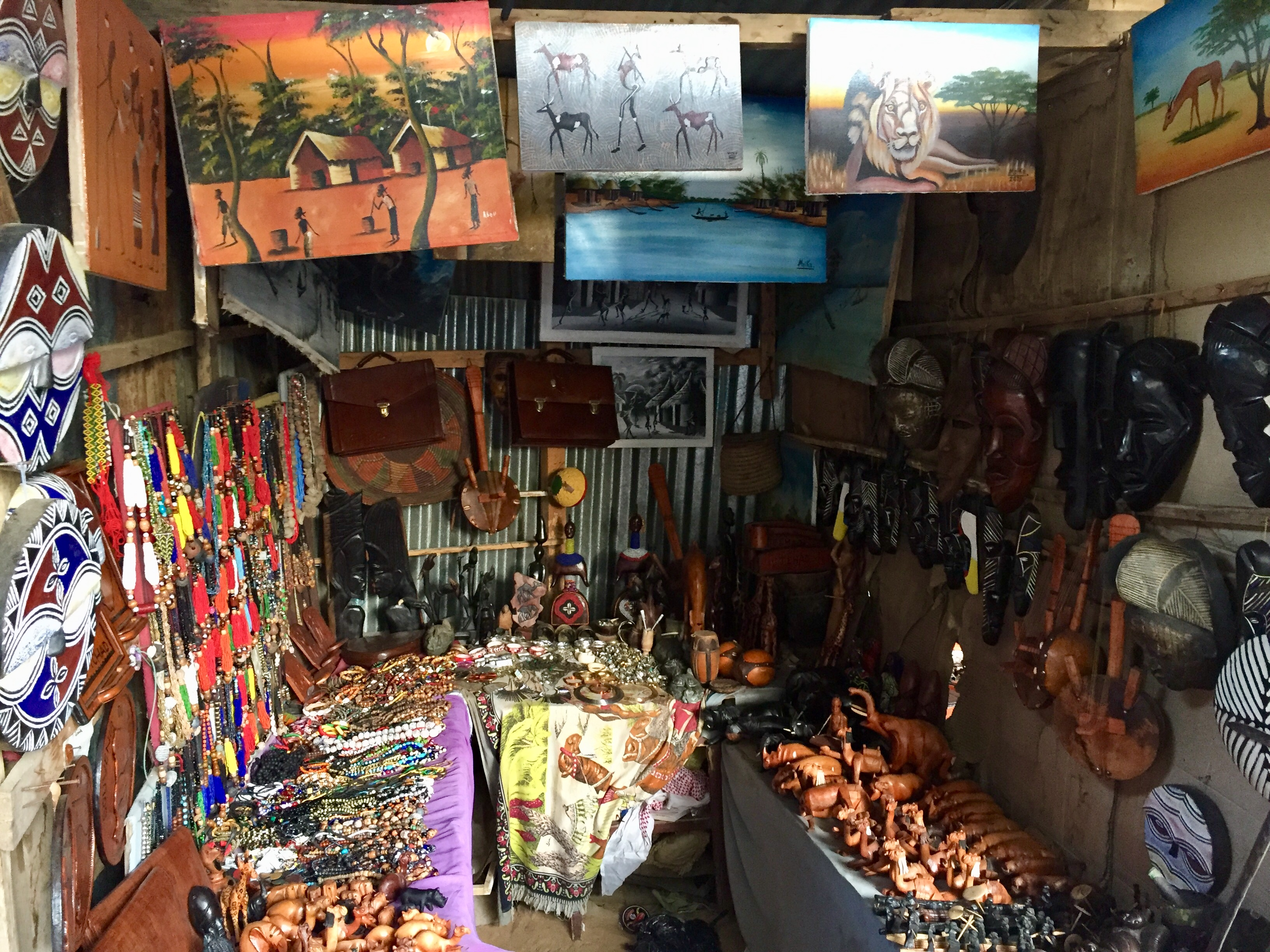 Çad'ın başkenti N'Djamena'da yerel el üretimi yapan bir hediyelik eşya dükkanı, 2018